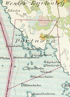 Karta Pörtnor Pyttis 1914 (Pyhtää)